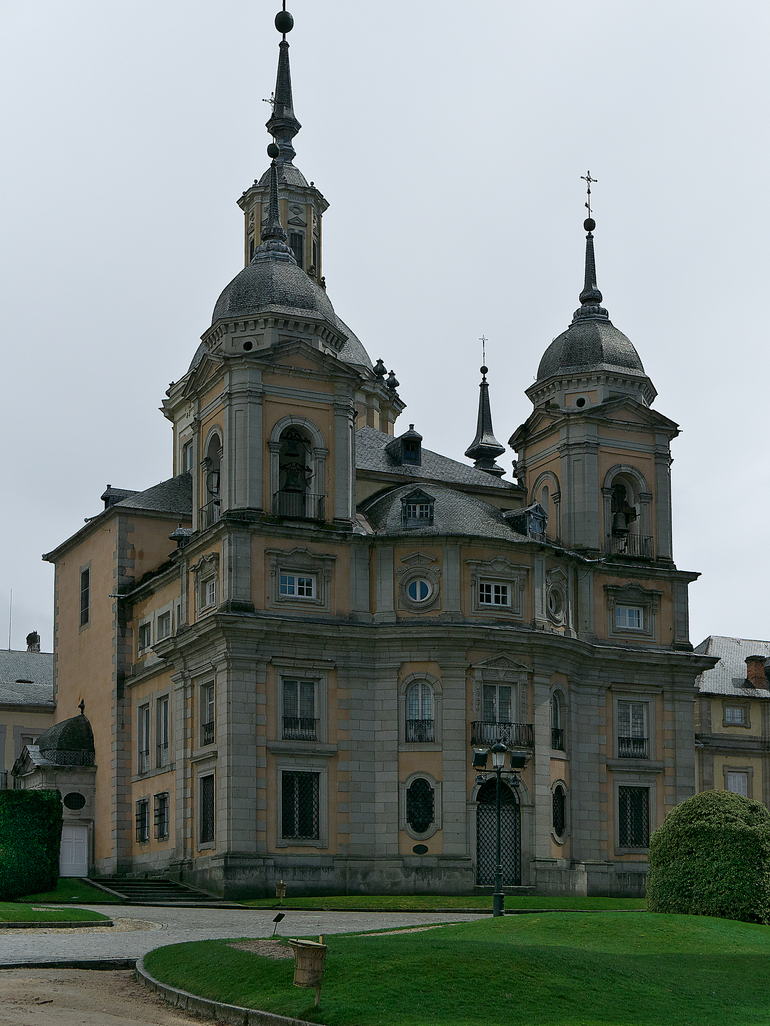 Cabecera de la Real Colegiata (ca 1719), según proyecto de Teodoro Ardemans.